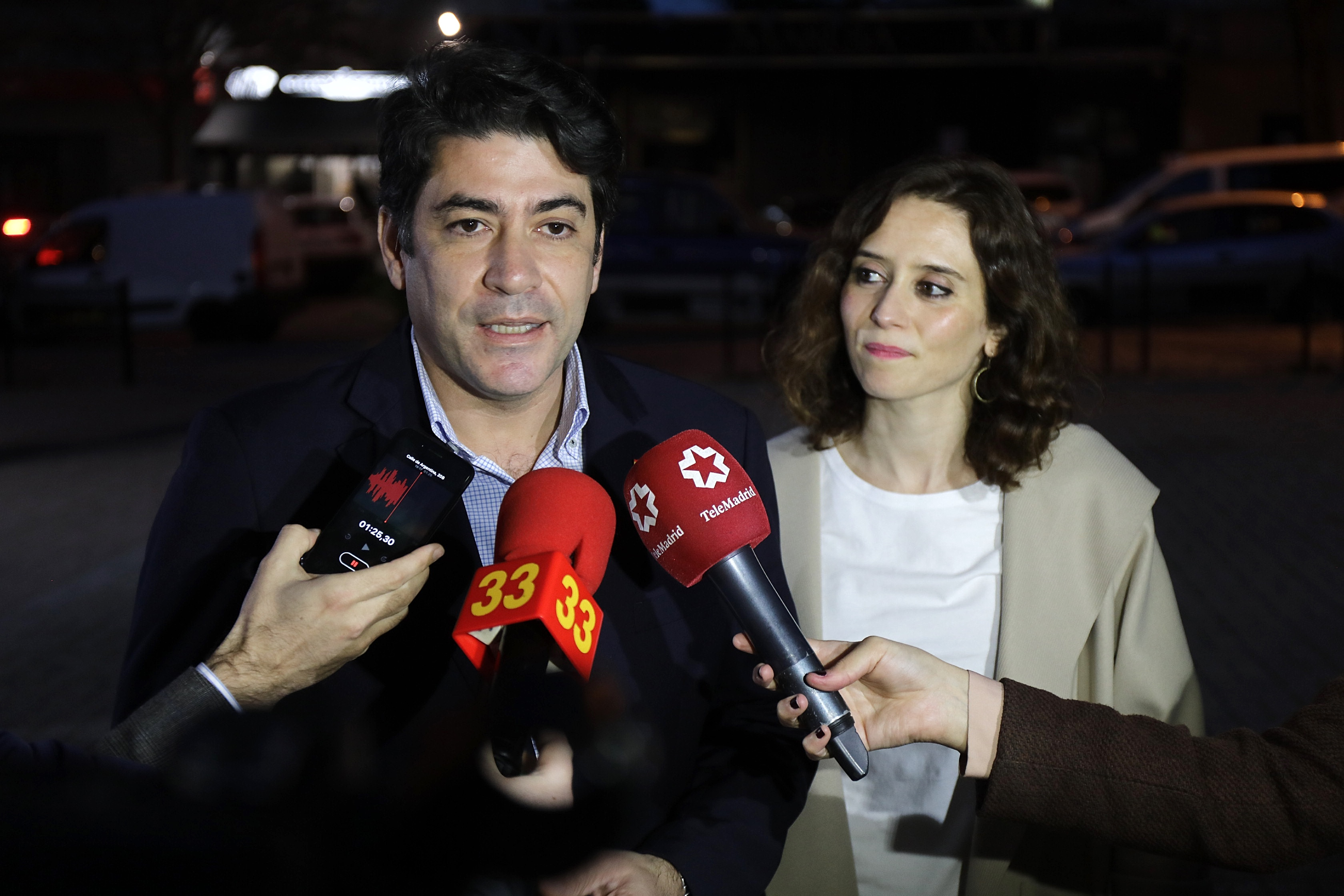 4654849922057637304_AACU0824